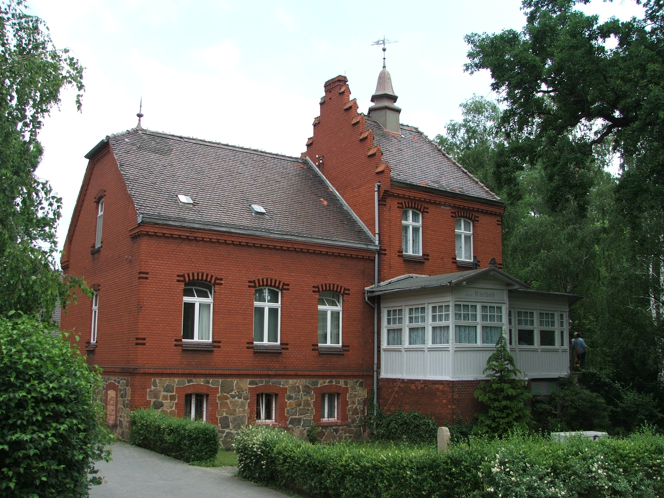 eheamliges Kurhaus in Herzberg(Elster)